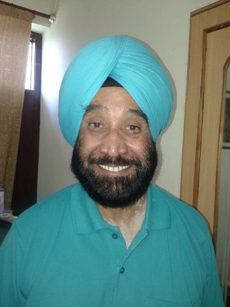 Punjabi Author